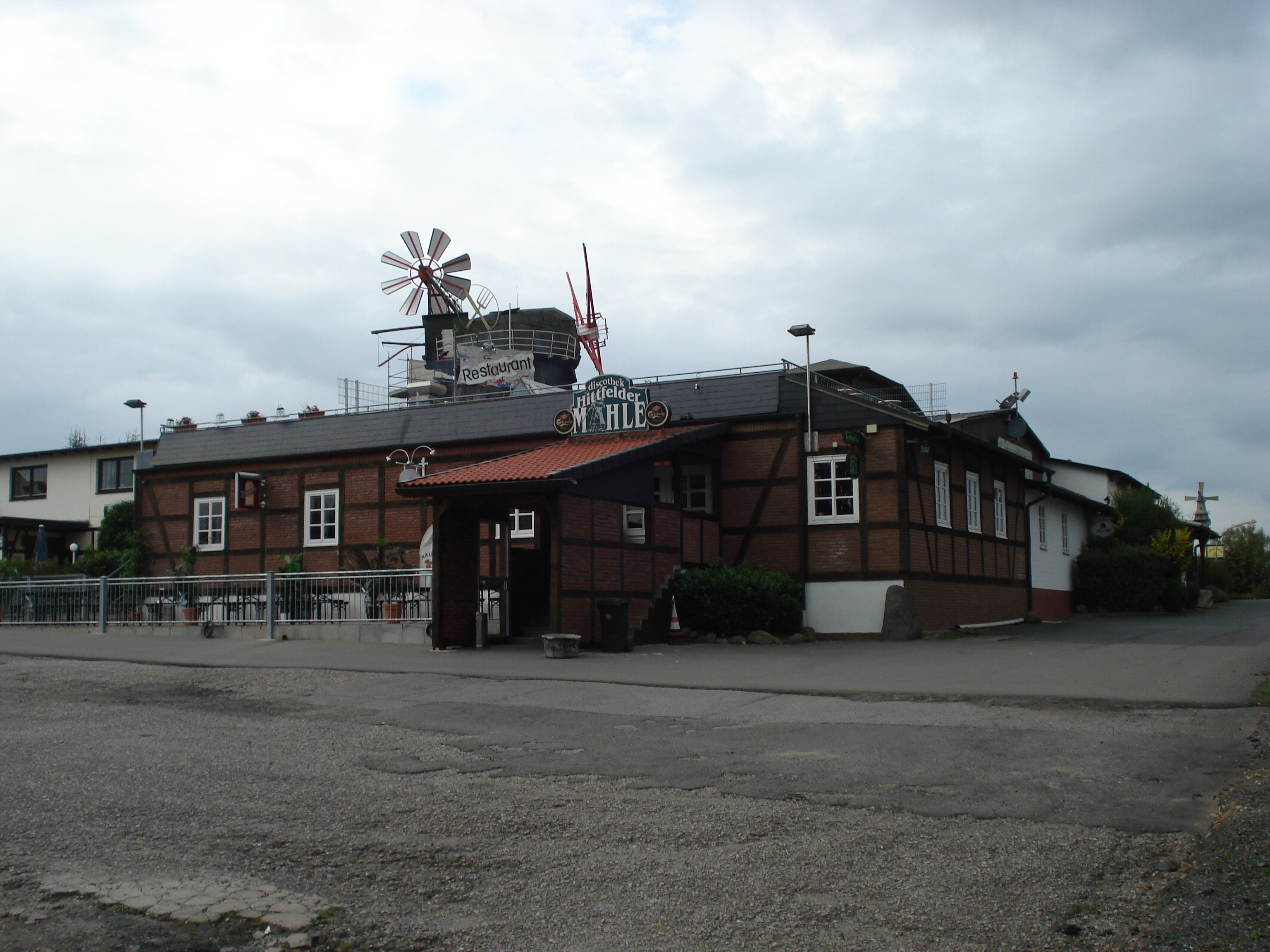 Hittfelder Mühle